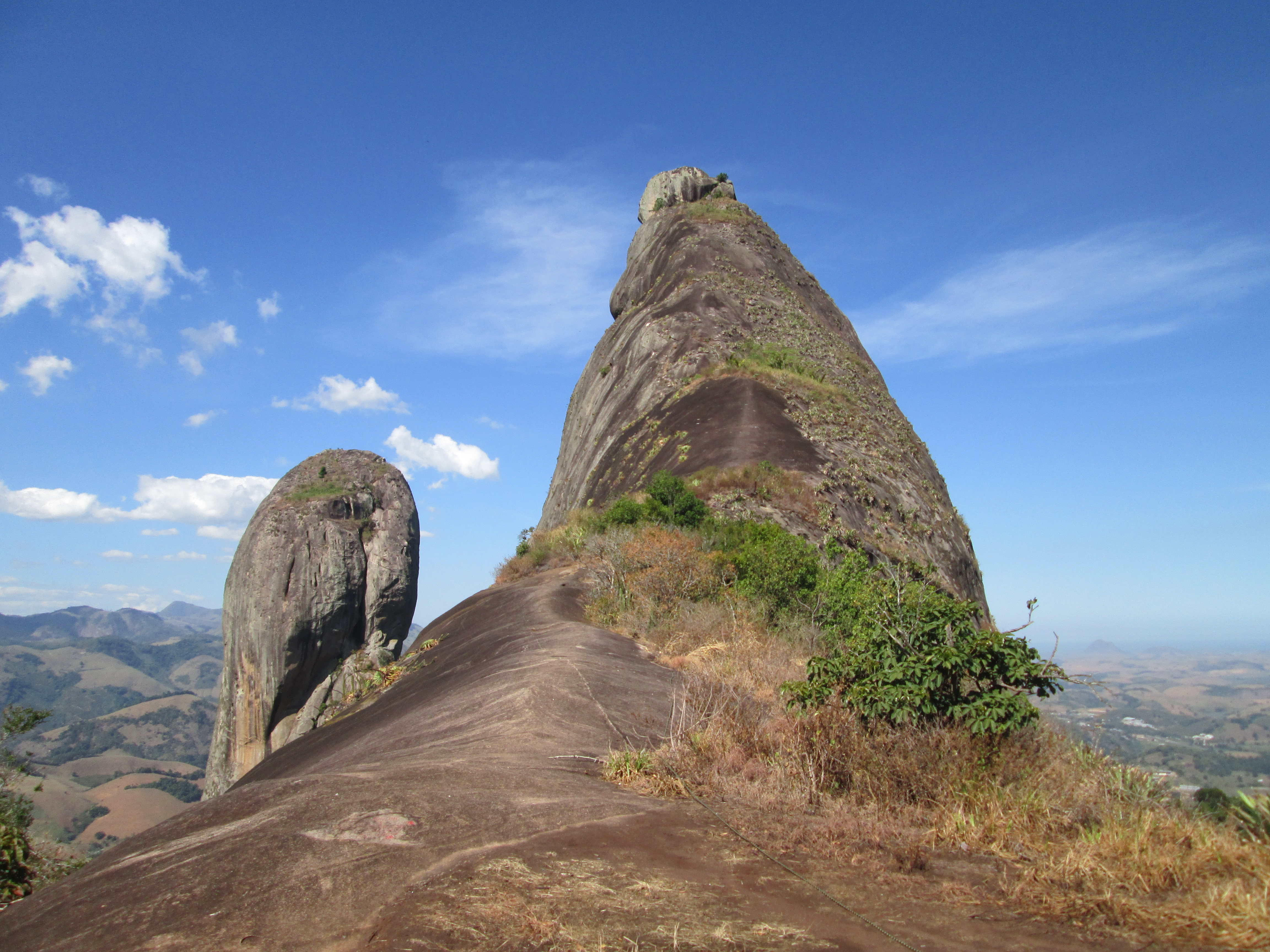 Trilha Pedra de Frade